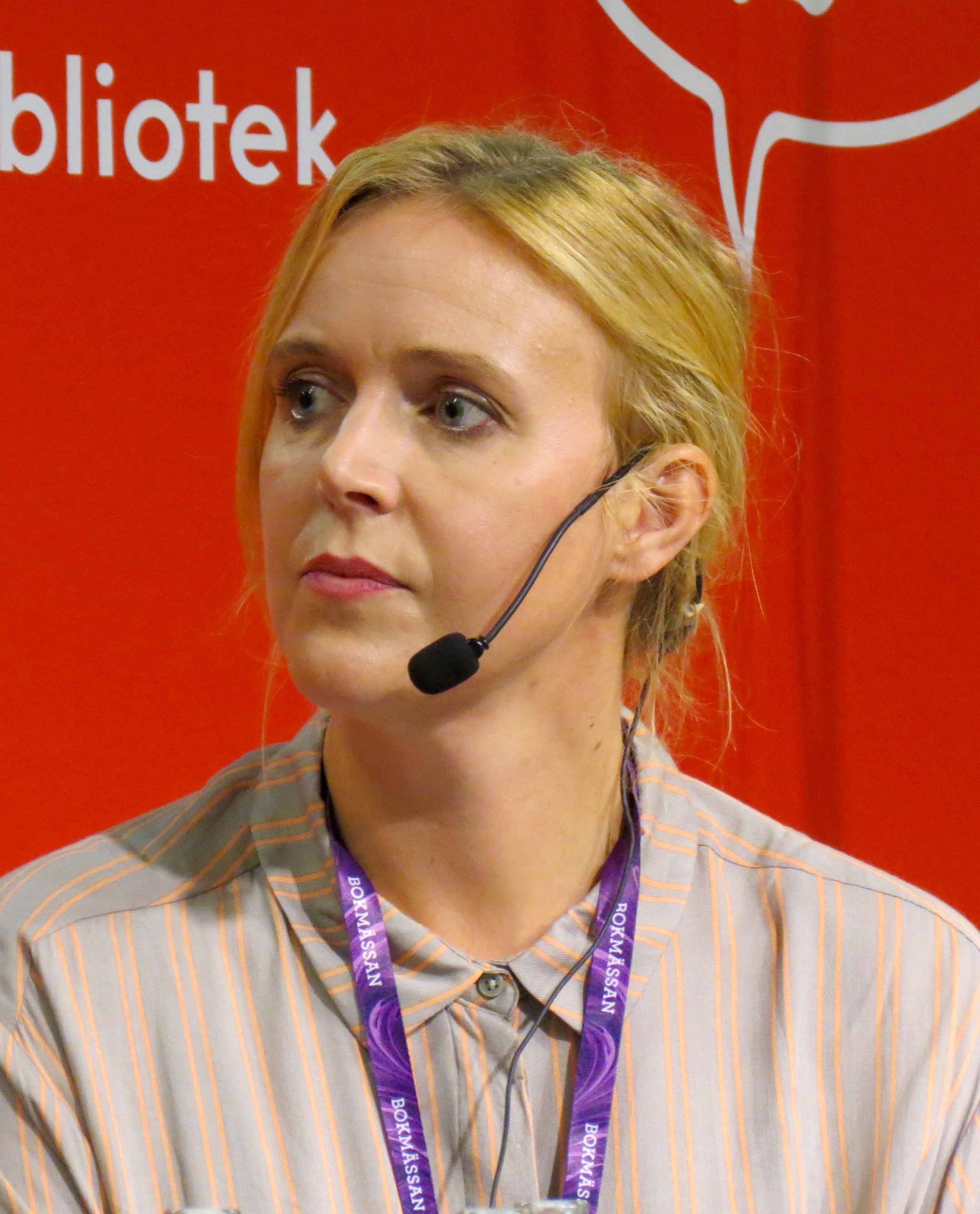 Sofia Olsson på Bokmässan i Göteborg 2018.